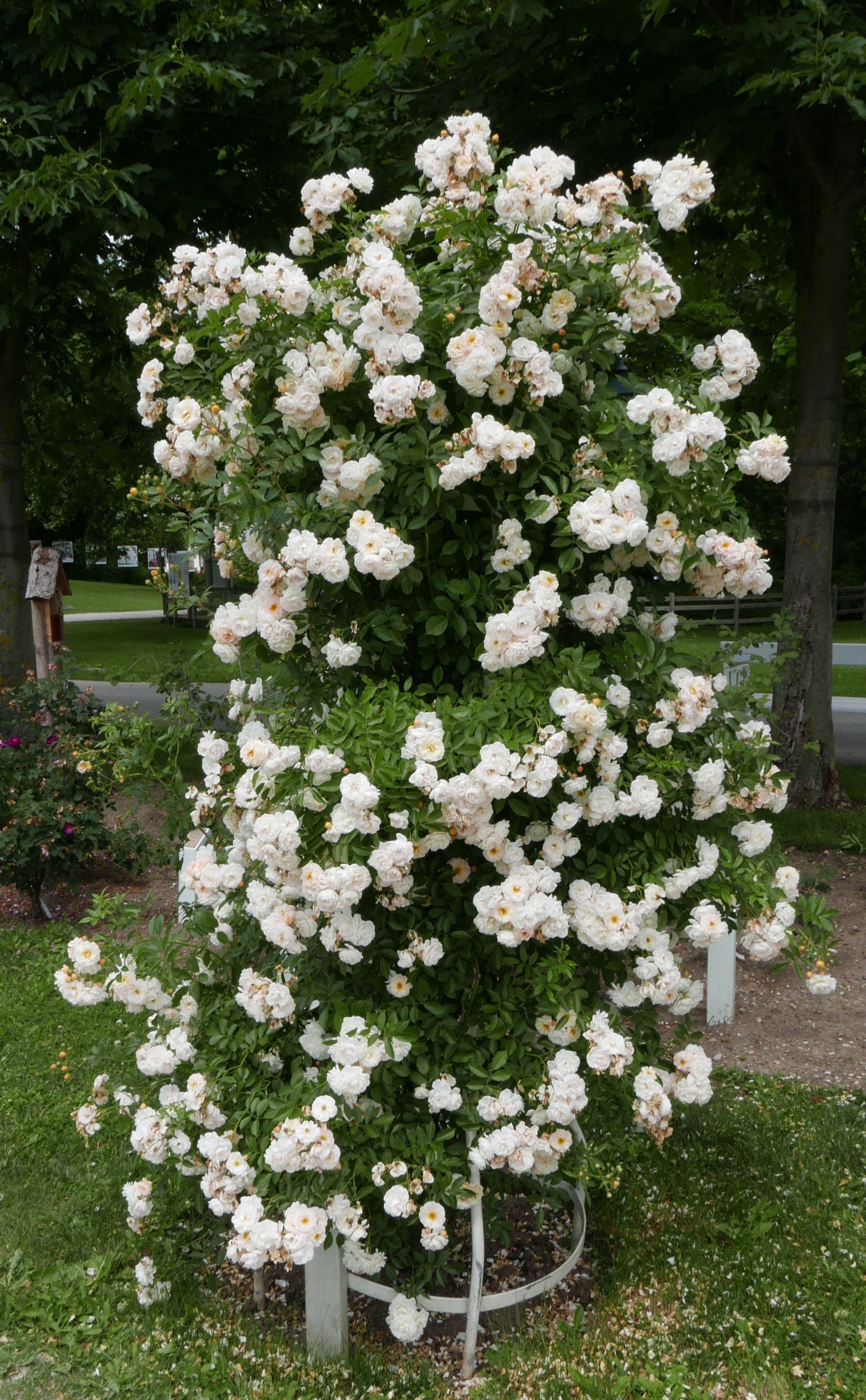 Rosarium Baden im Doblhoffpark (BD-122): Rosa 'Ghislaine de Feligonde', fotografiert im Juni 2018 This media shows the natural monument in Lower Austria with the ID BD-122.